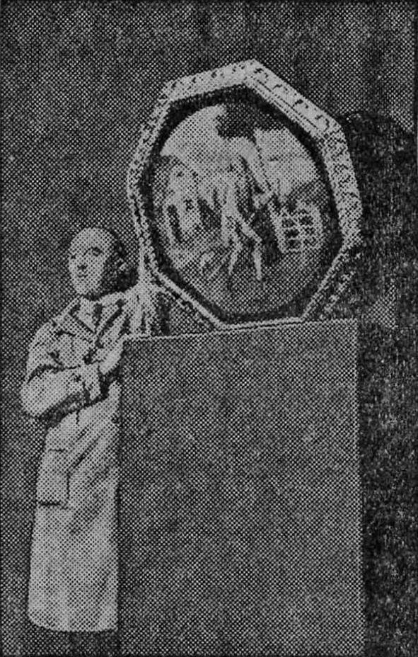 Veiling van de verzameling Figdor te Berlijn. Afkomstig uit de Nieuwe Tilburgsche Courant, 52e jaargang, nummer 10885 (woensdag 1 oktober 1930), Derde blad, [p. 4].